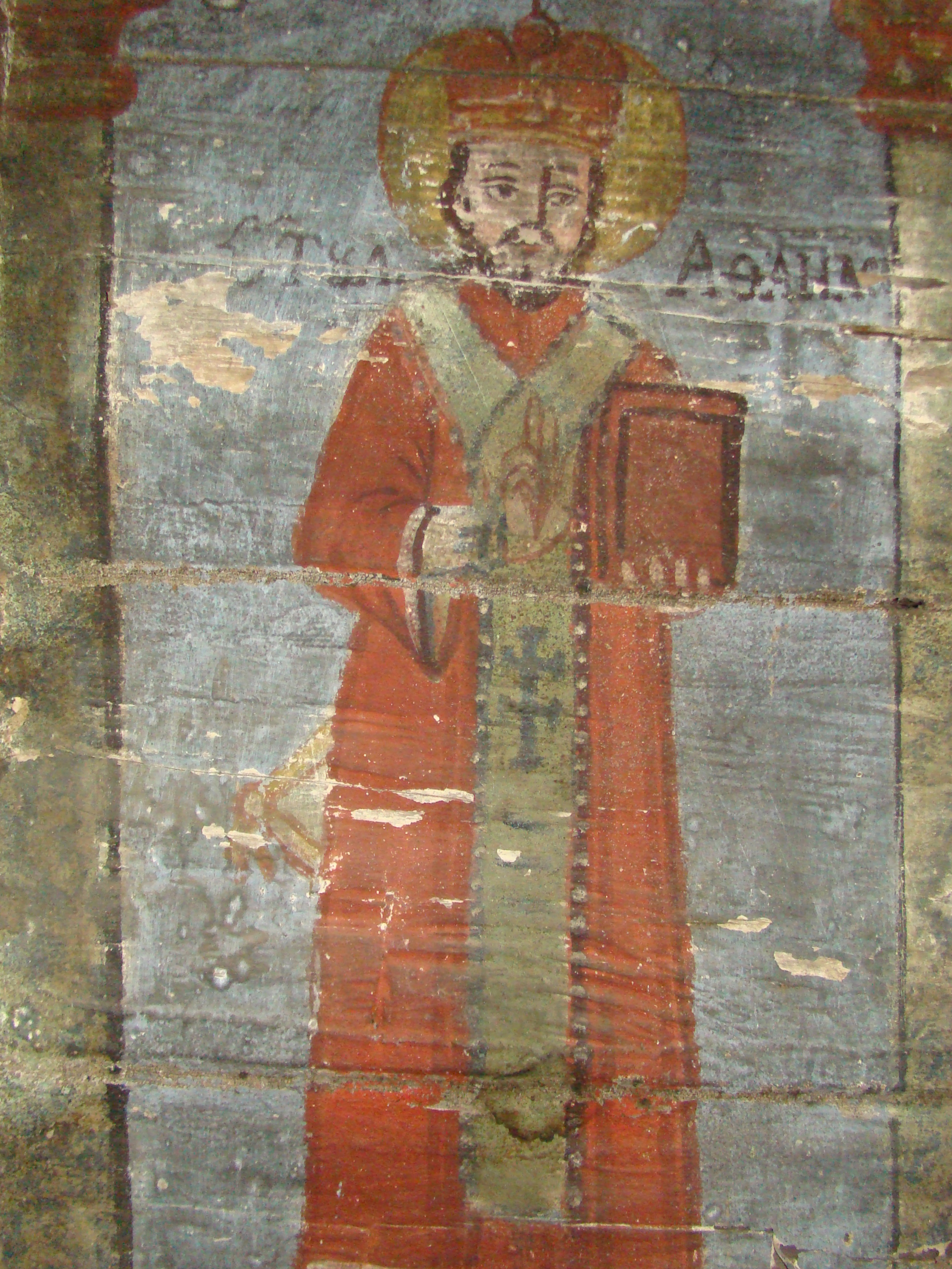 Biserica de lemn "Cuvioasa Paraschiva" , sat STEJERA; comuna MIREŞU MARE